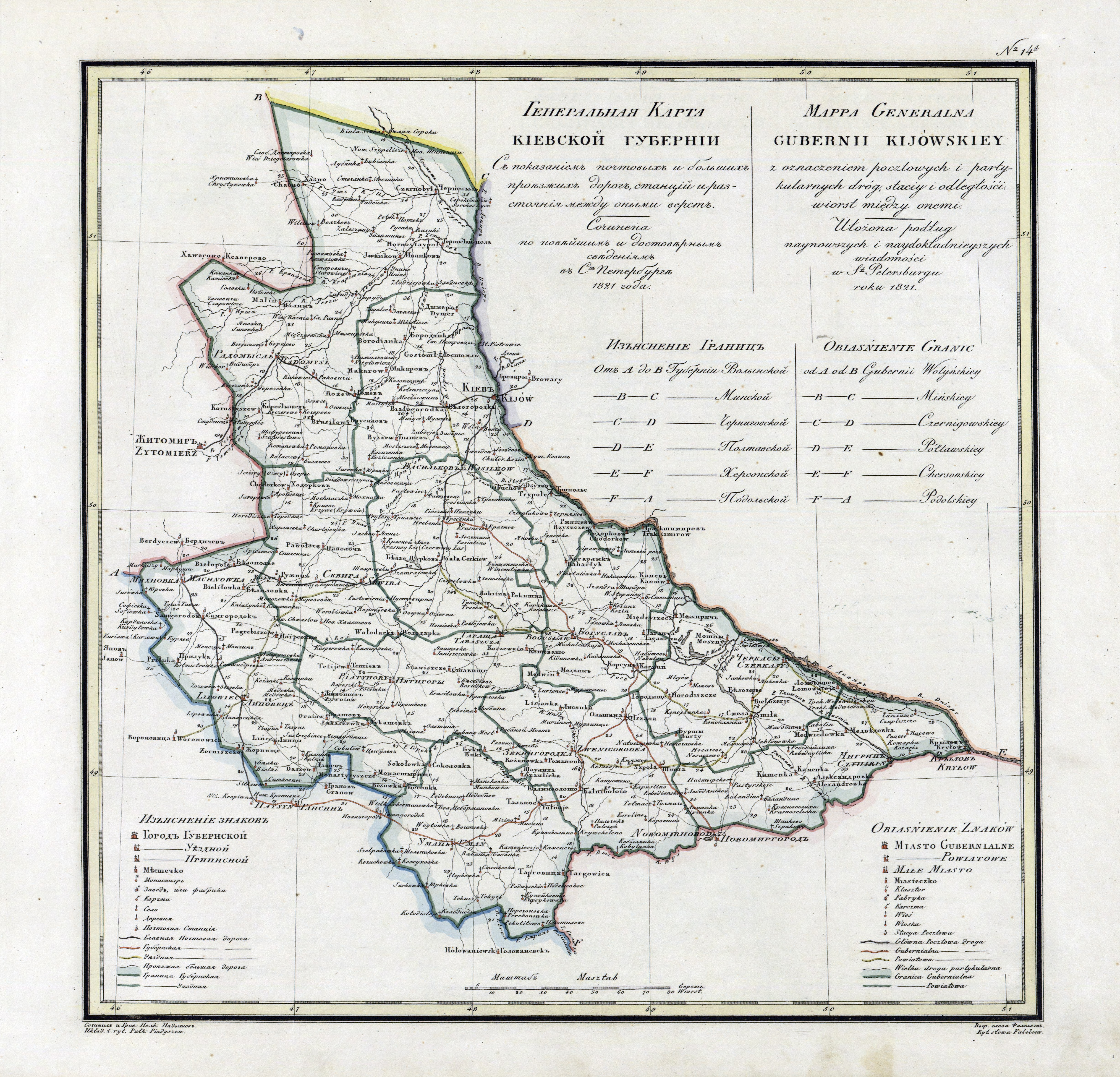 Map of Kiev Governorate, 1821. Карта Киевской губернии